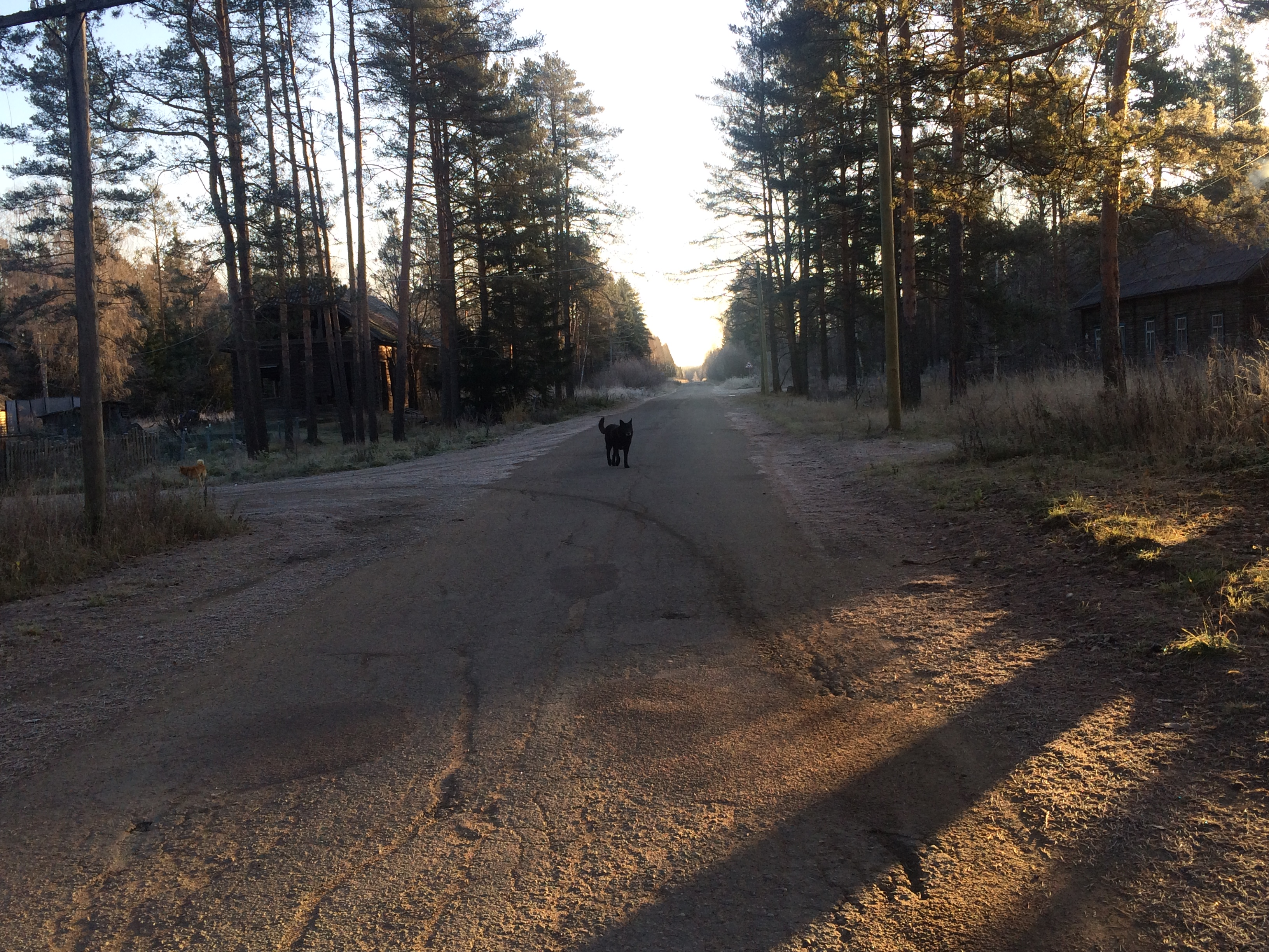 Кетроваара